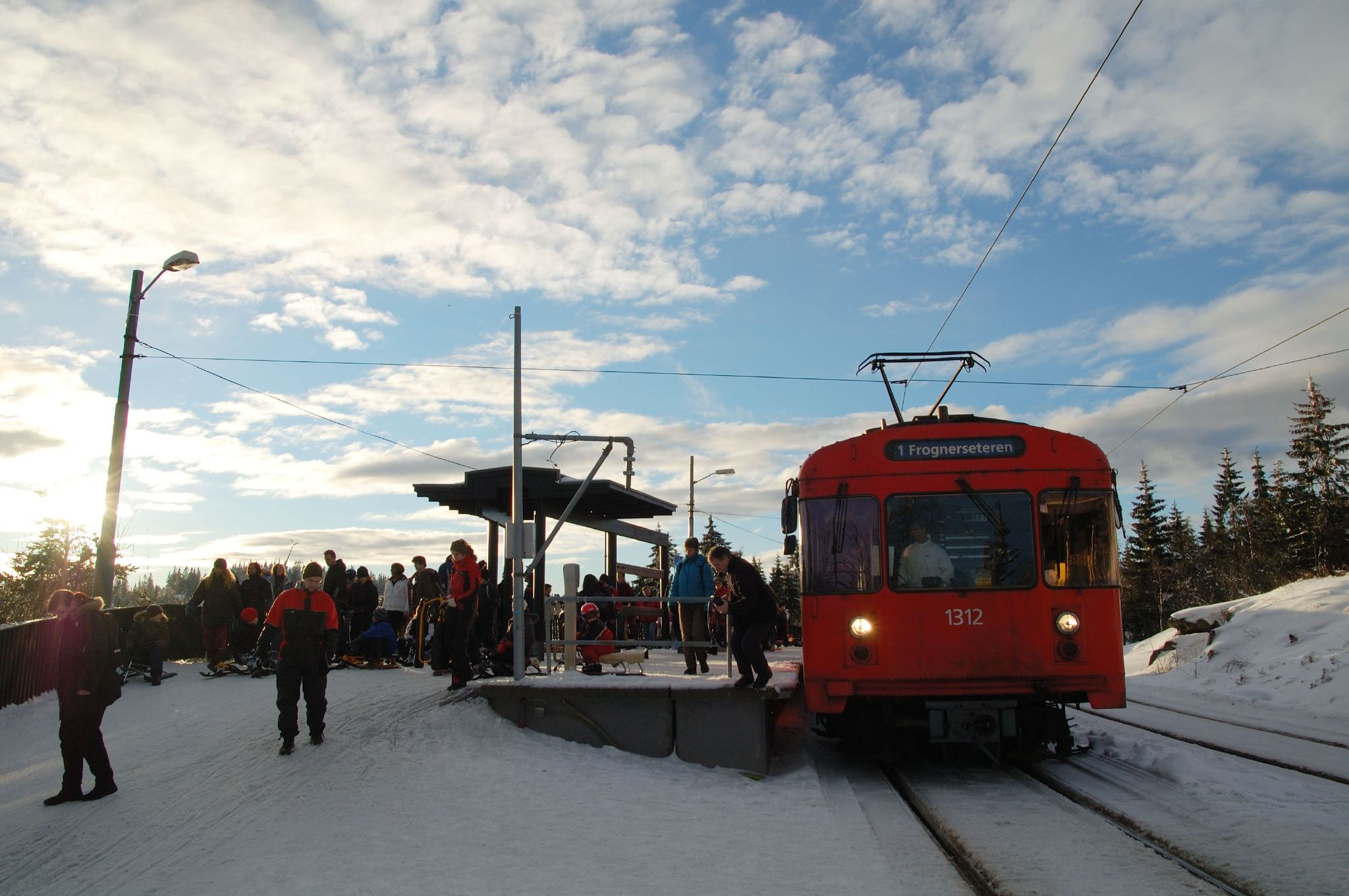 T1300-vognsett på Frognerseteren stasjon på T-banen i Oslo